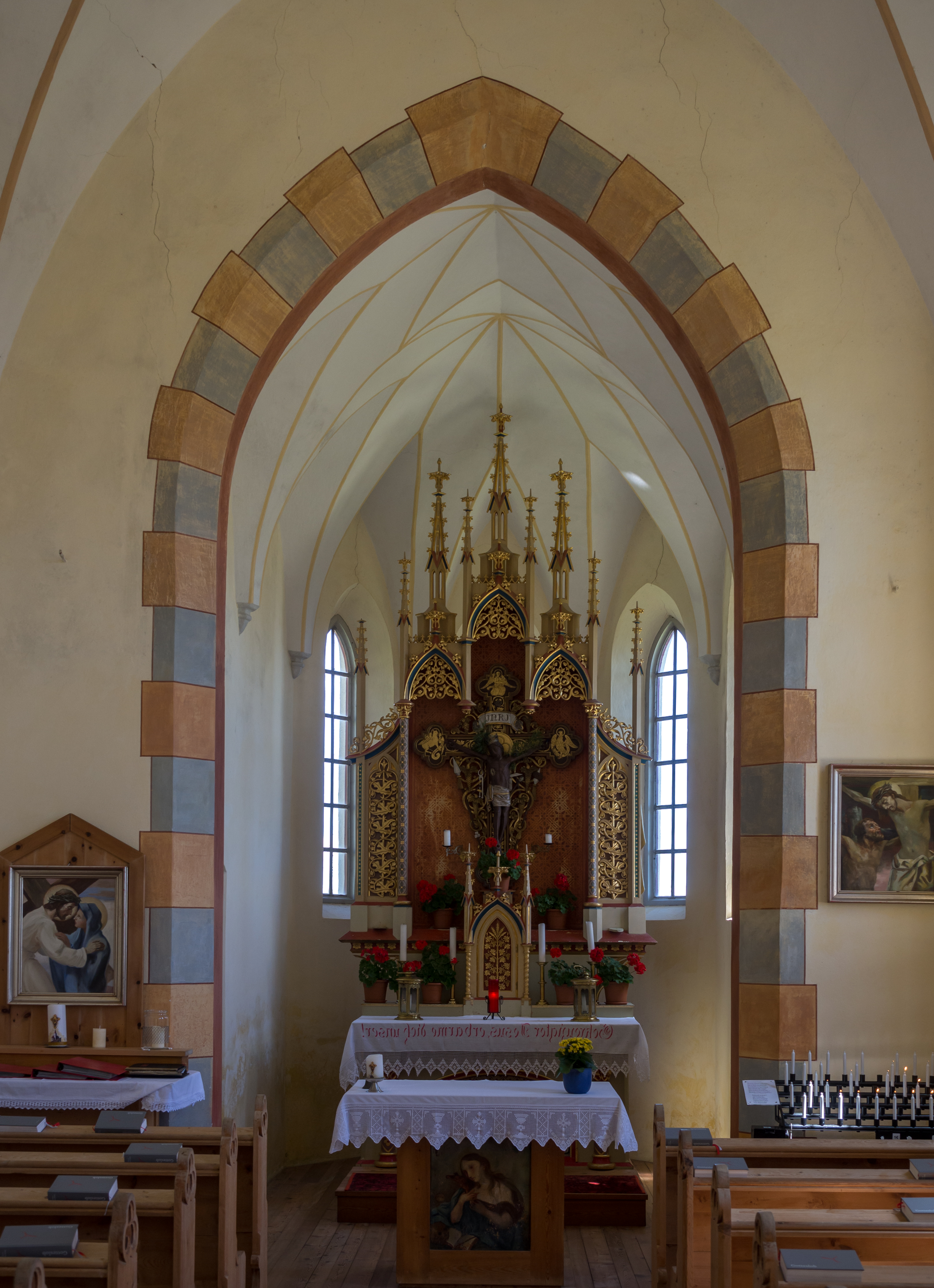 Blick in den Altarraum der Kirche am Latzfonser Kreuz